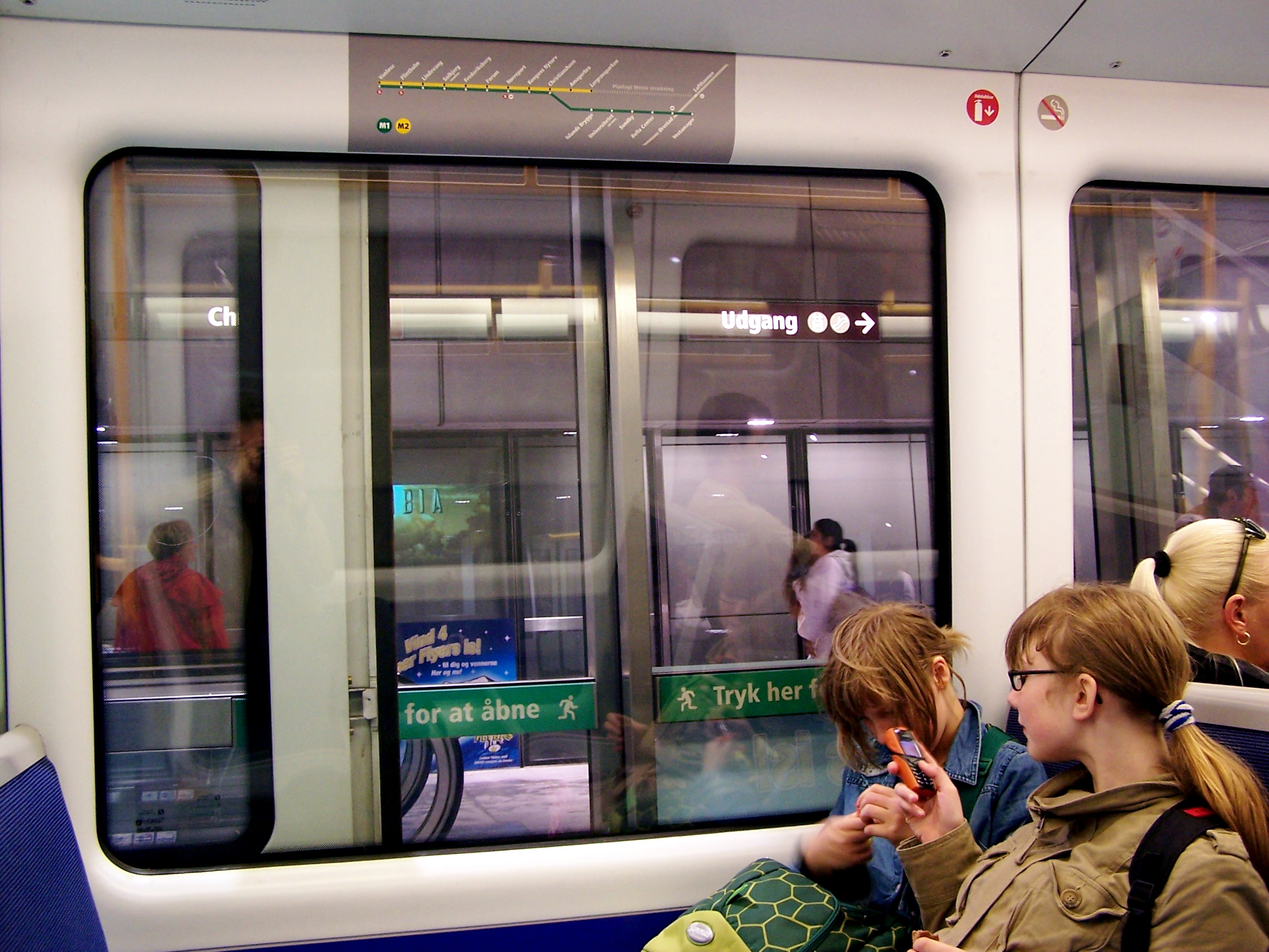 Inside of a Copenhagen metro train